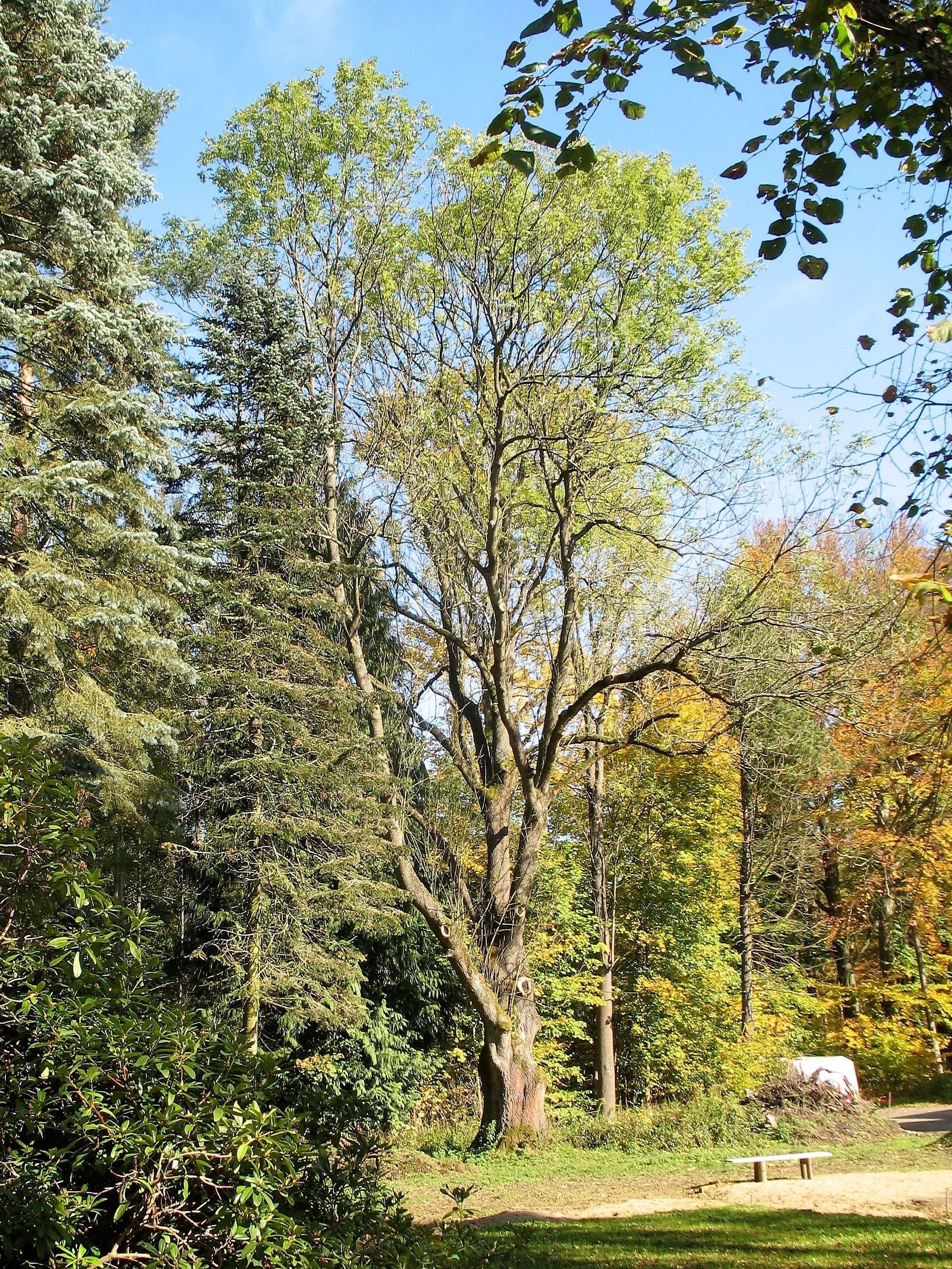 Památný strom jasan ztepilý v areálu lázní